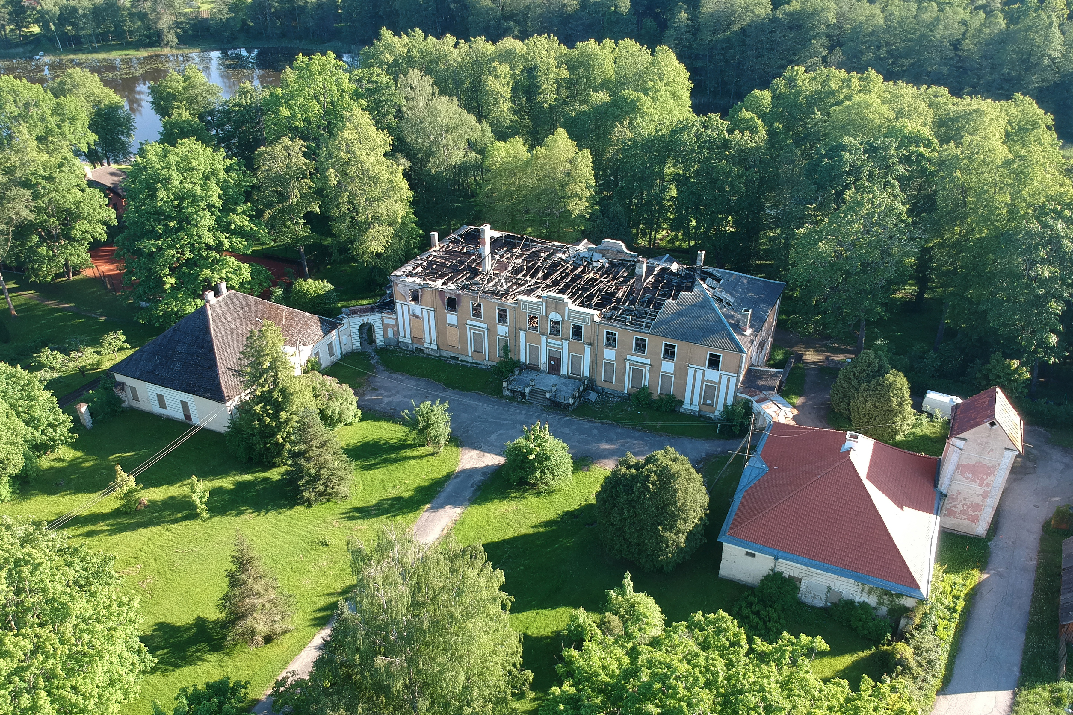 Väimela mõisa peahoone 2019. aasta juunis